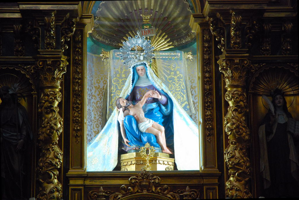 Vírgen de las Angustias (Ermita de las Angustias, Navalmoral de la Mata)